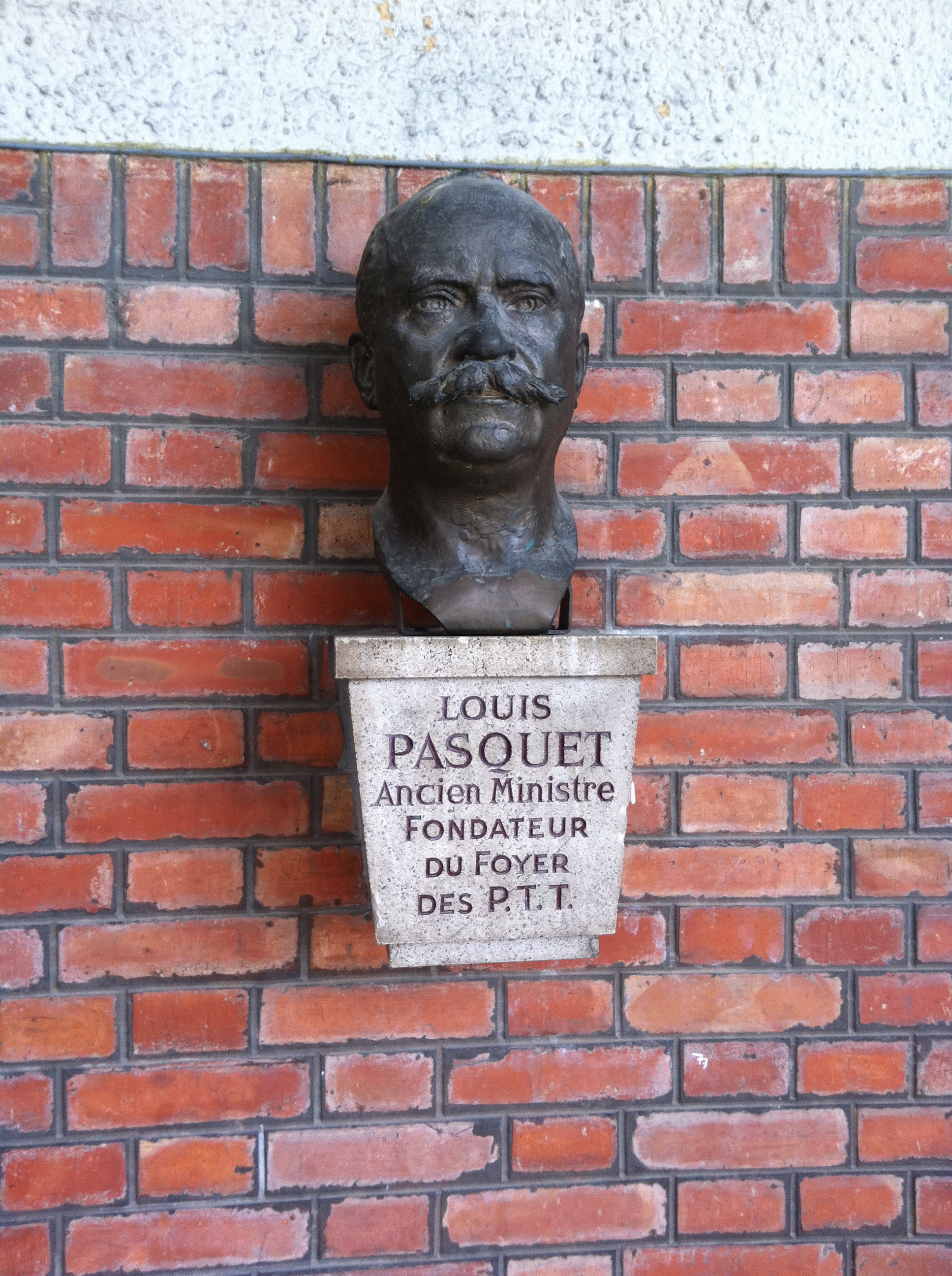 Buste sur la façade du Foyer des PTT de Cachan Val de Marne